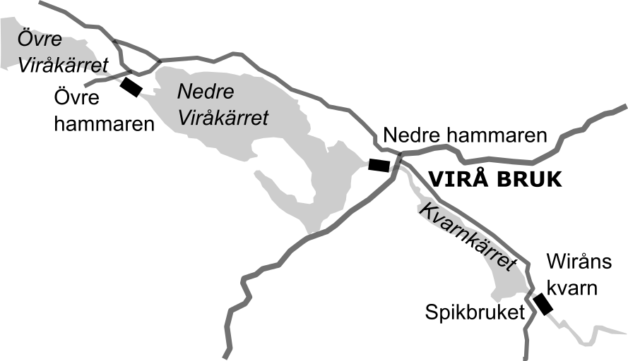 Virå Bruks järnbruksanläggningar 1642-1899. Vägmarkeringar enl Häradsekonomiska kartan 1895.